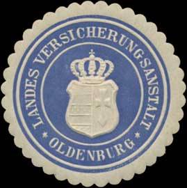 Sealing stamp Title: Landes Versicherungsanstalt Oldenburg Description: blau, weiß, geprägt Place: Oldenburg size: 4 cm